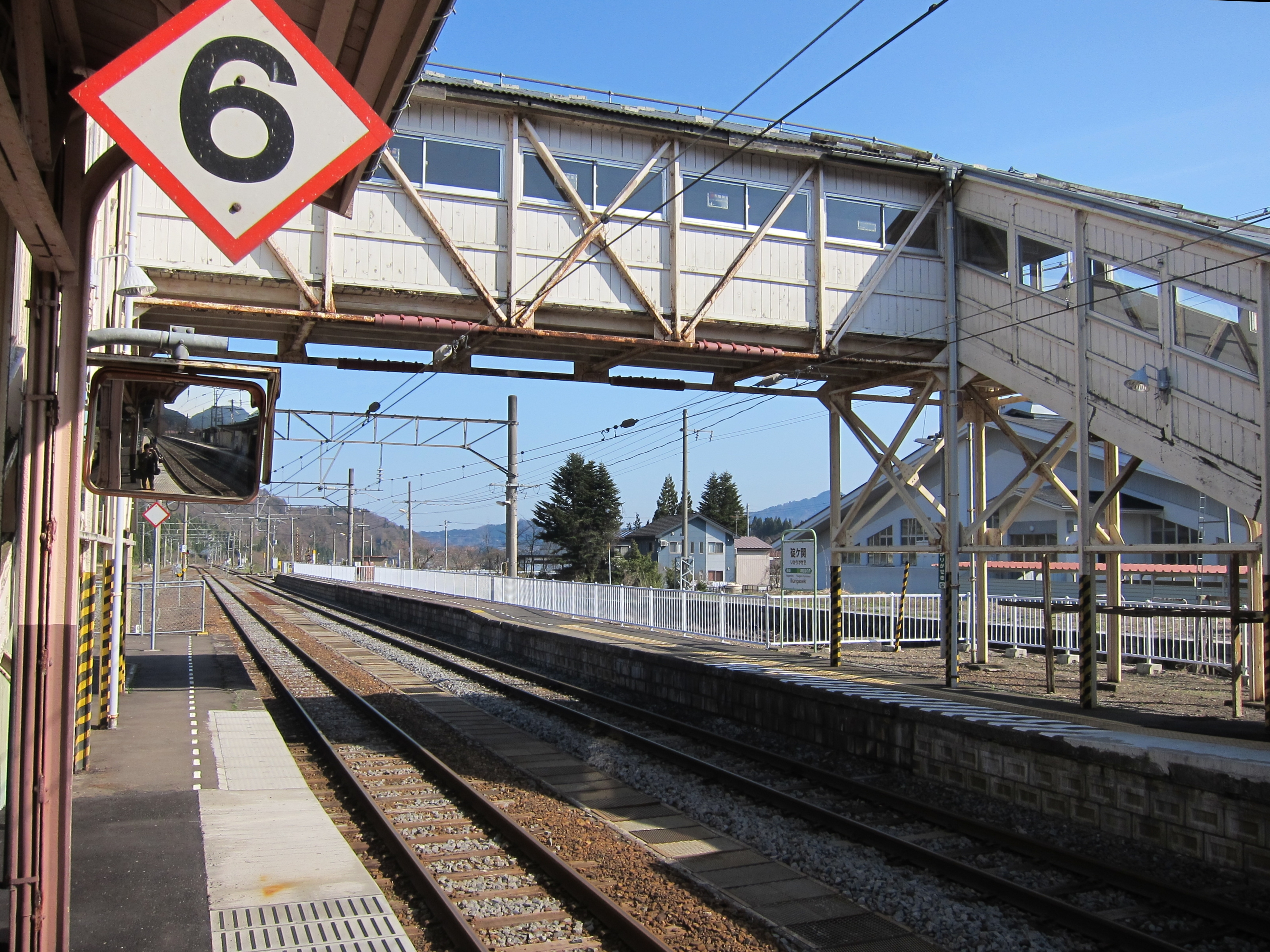 Ikarigaseki station